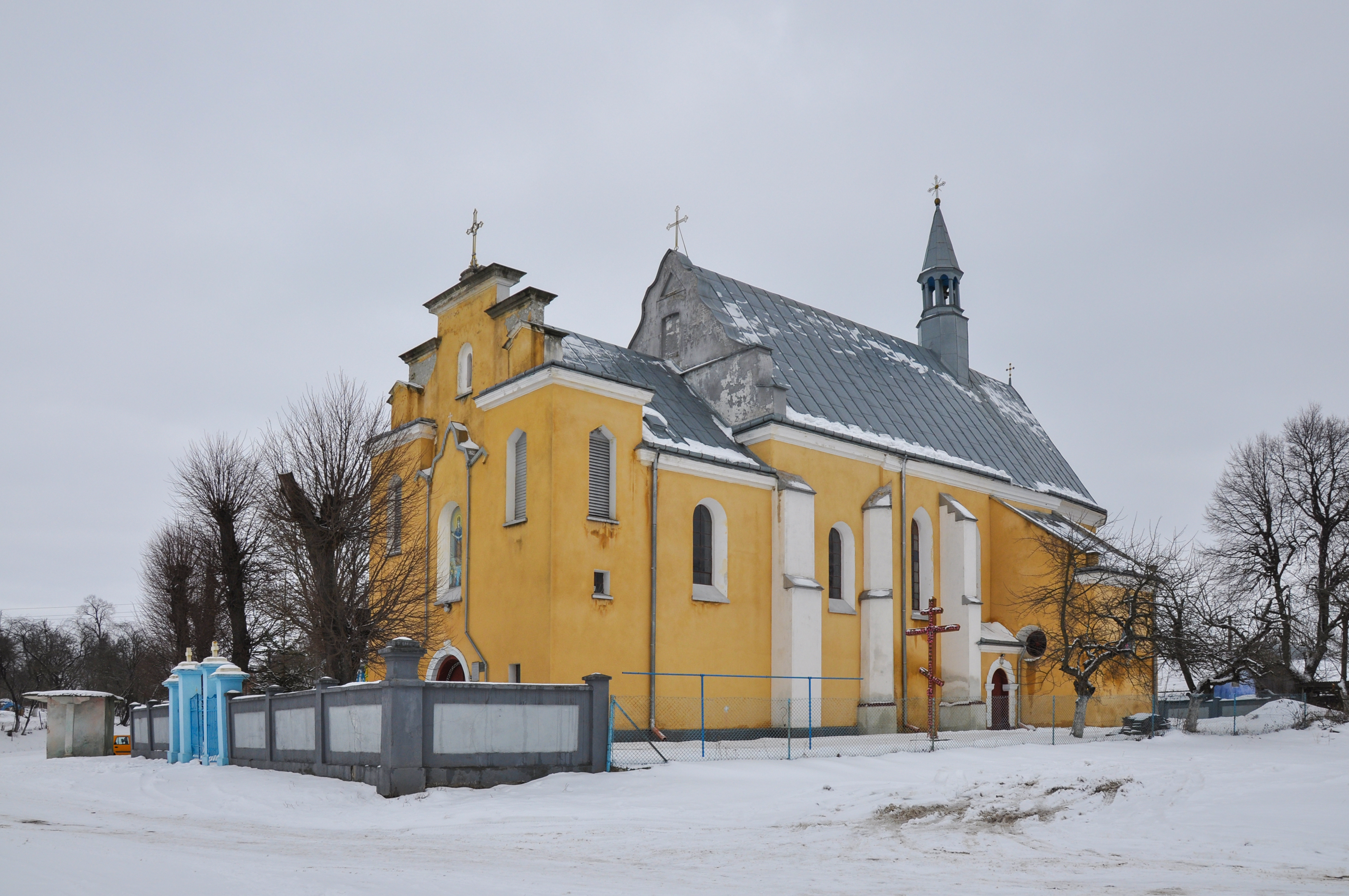 Костел Св. Дороти (мур.), Тулиголове